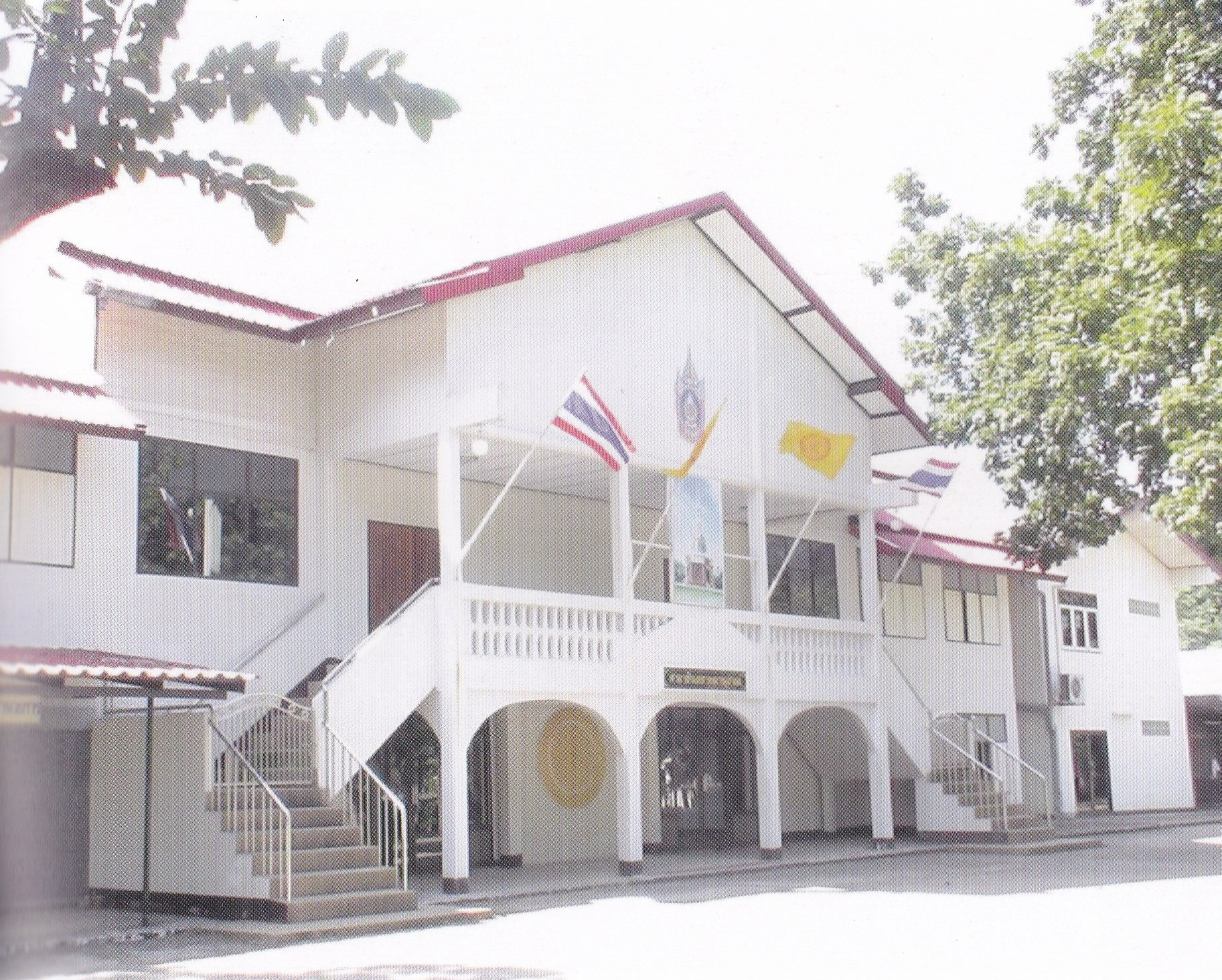 ศาลาขันตยคมานุสรณ์